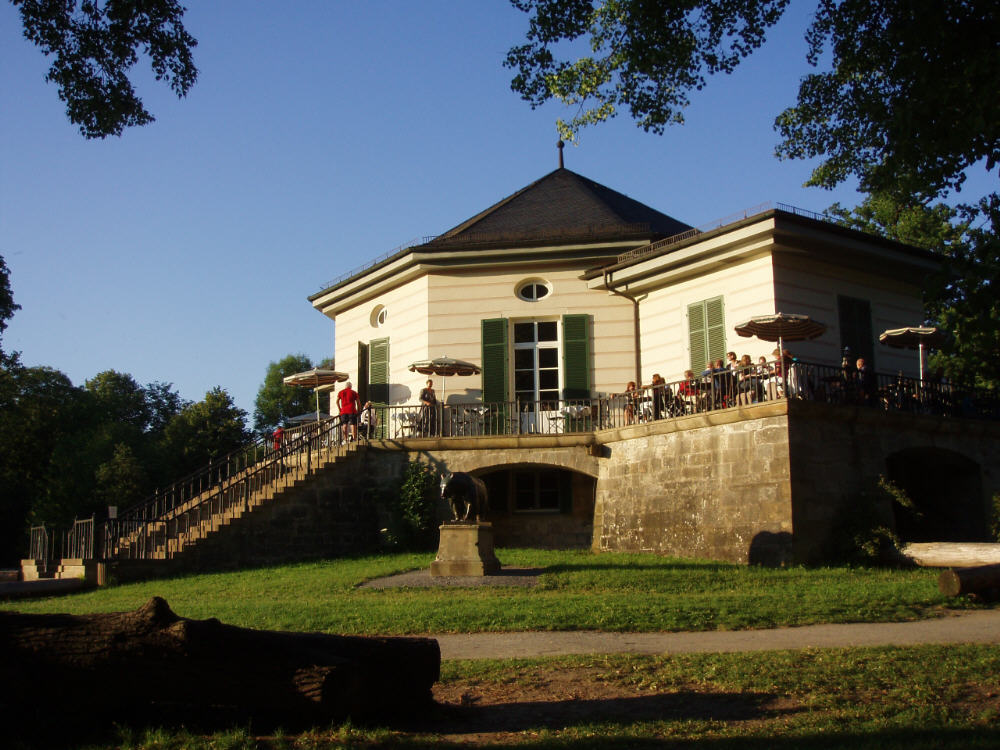 Bärenschlössle